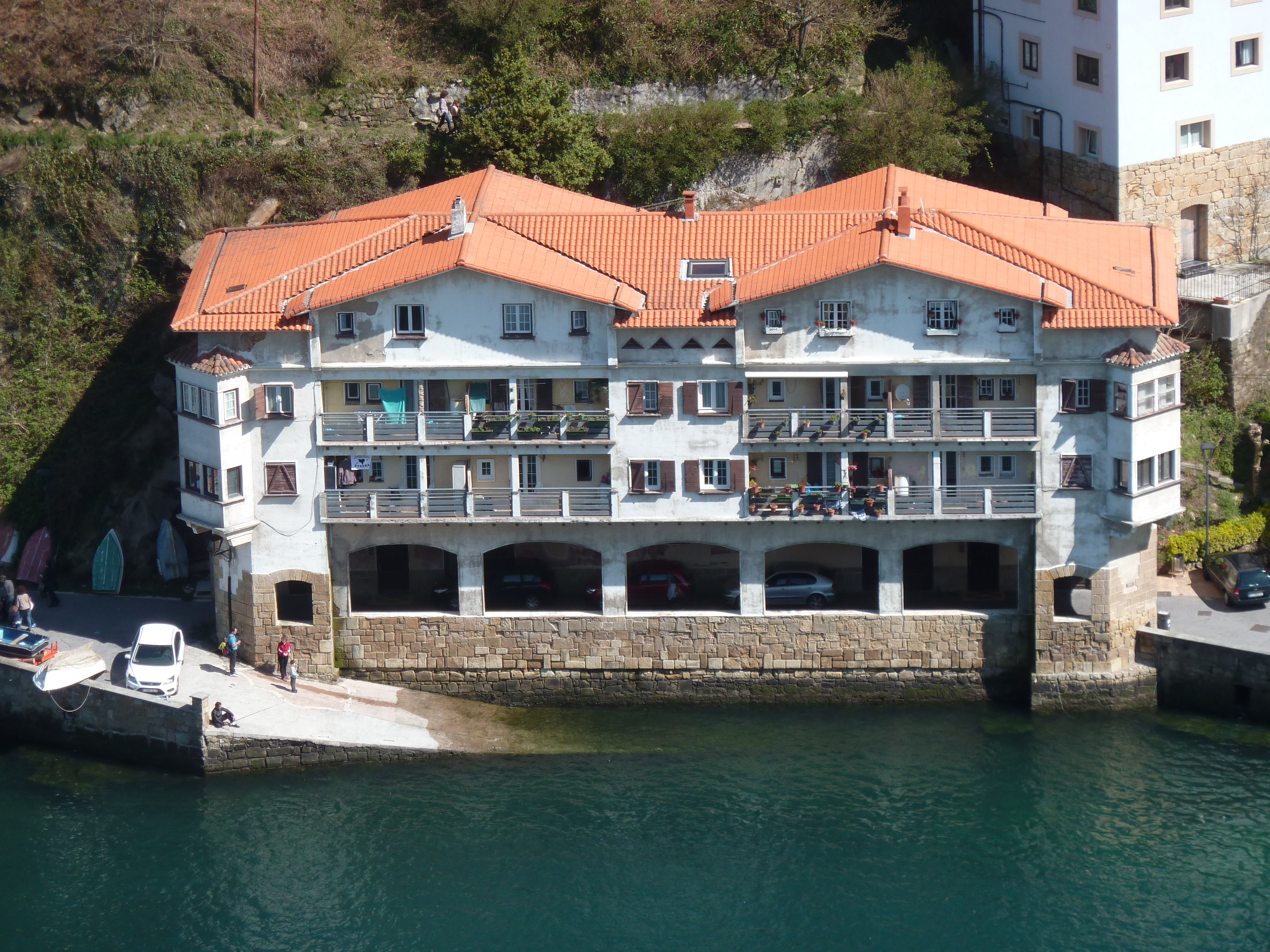 Pasai Donibanen, Erreka izeneko eraikina, Luis Tolosak diseinatua